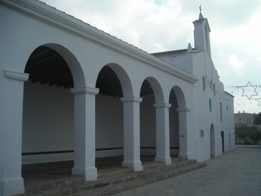 Iglesia de Nuestra Señora de Jesús